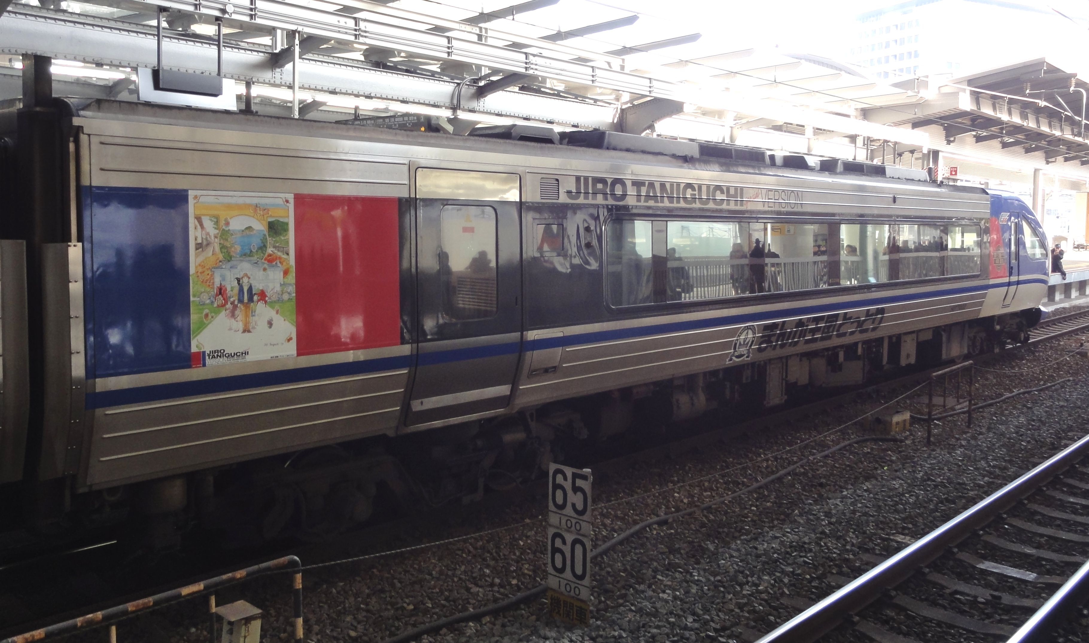 智頭急行HOT7000系気動車